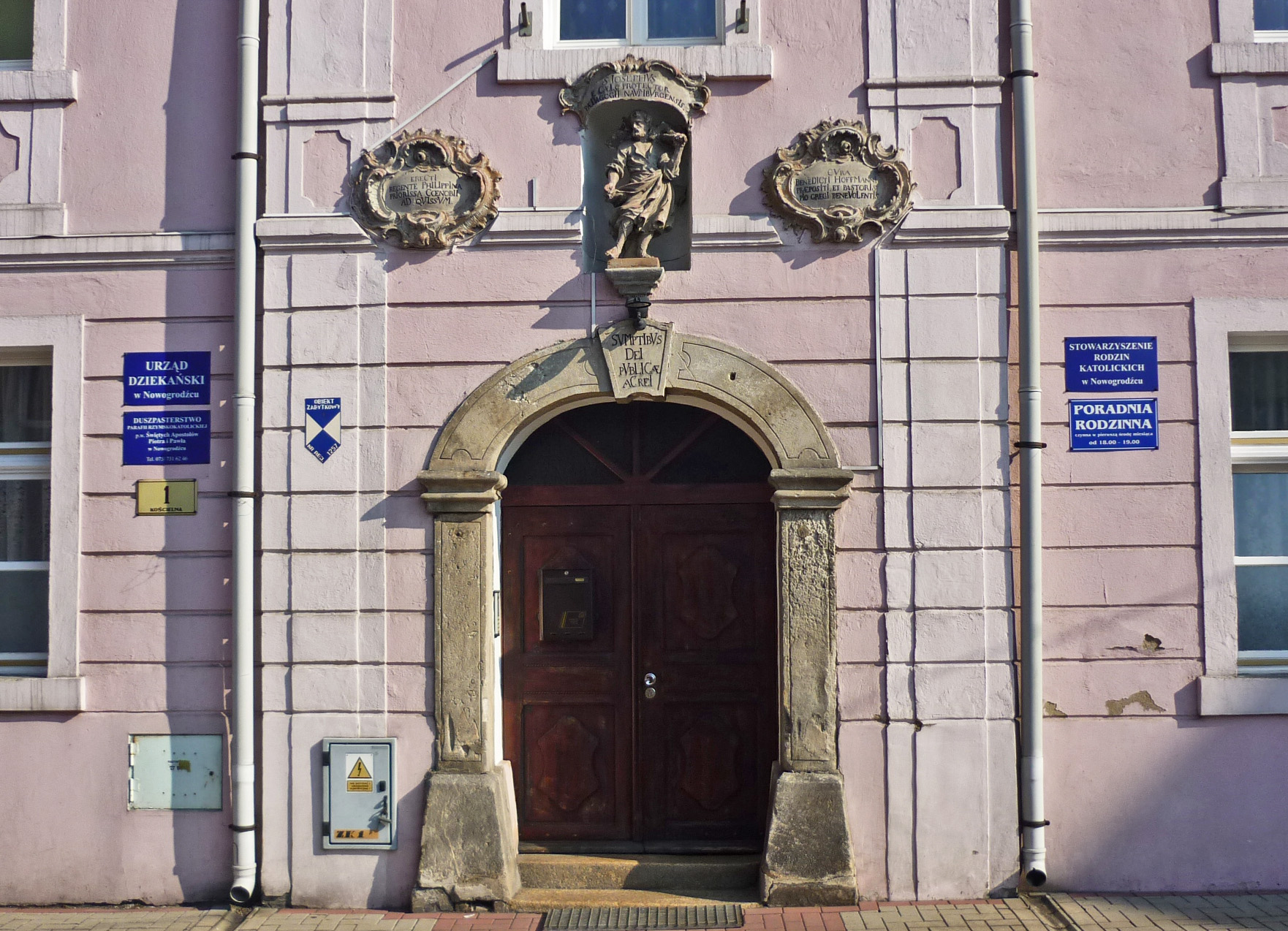 Portal des Geburtshauses des Komponisten Joseph Ignaz Schnabel in Naumburg am Queis (Nowogrodziec) in Niederschlesien